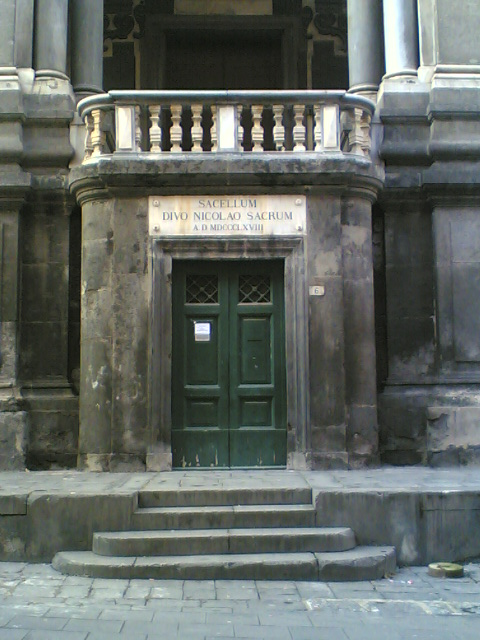 Chiesa di San Nicola di Bari sotto alla Chiesa di San Giuseppe dei Ruffi (Napoli)